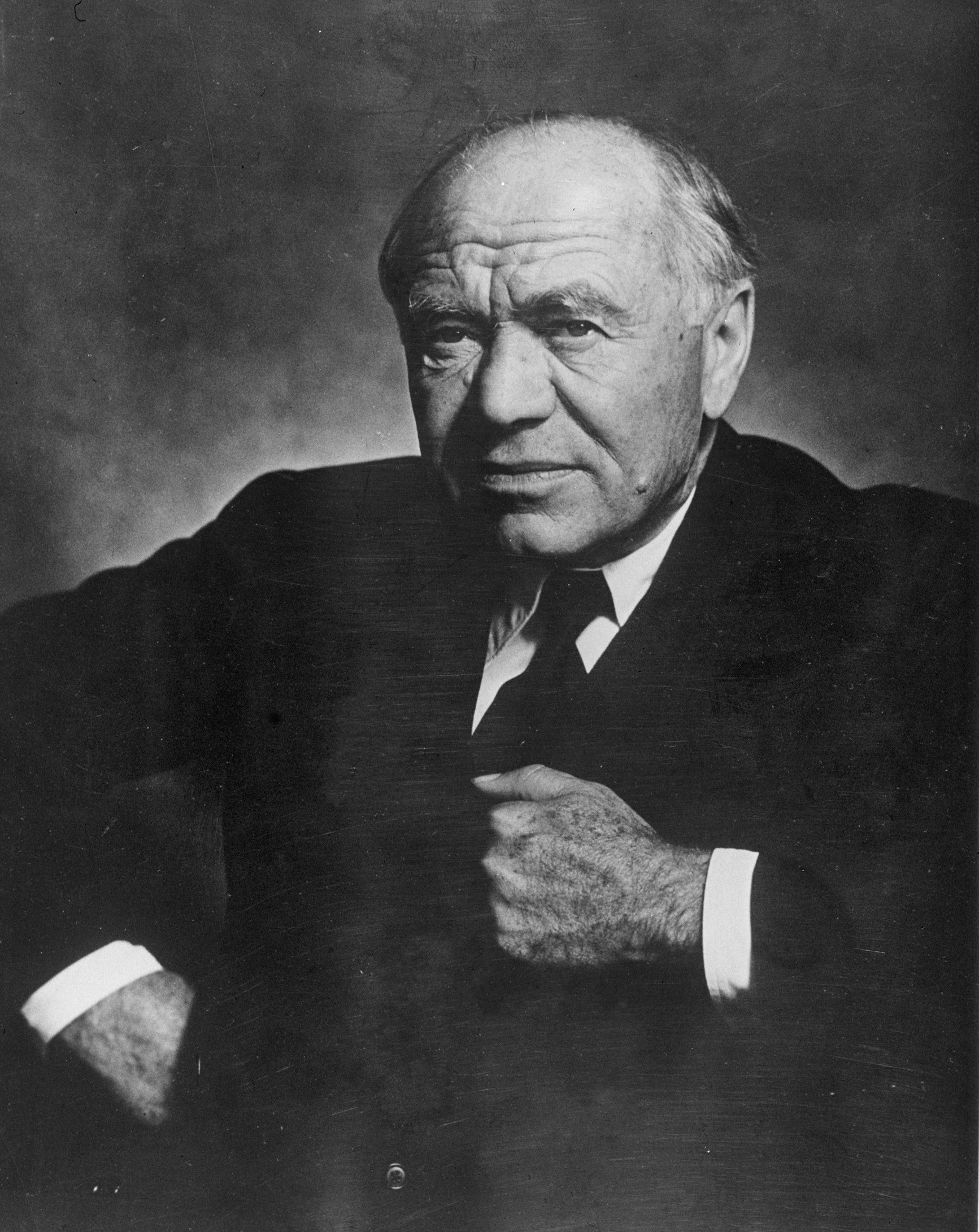 Max Aitken, Lord Beaverbrook